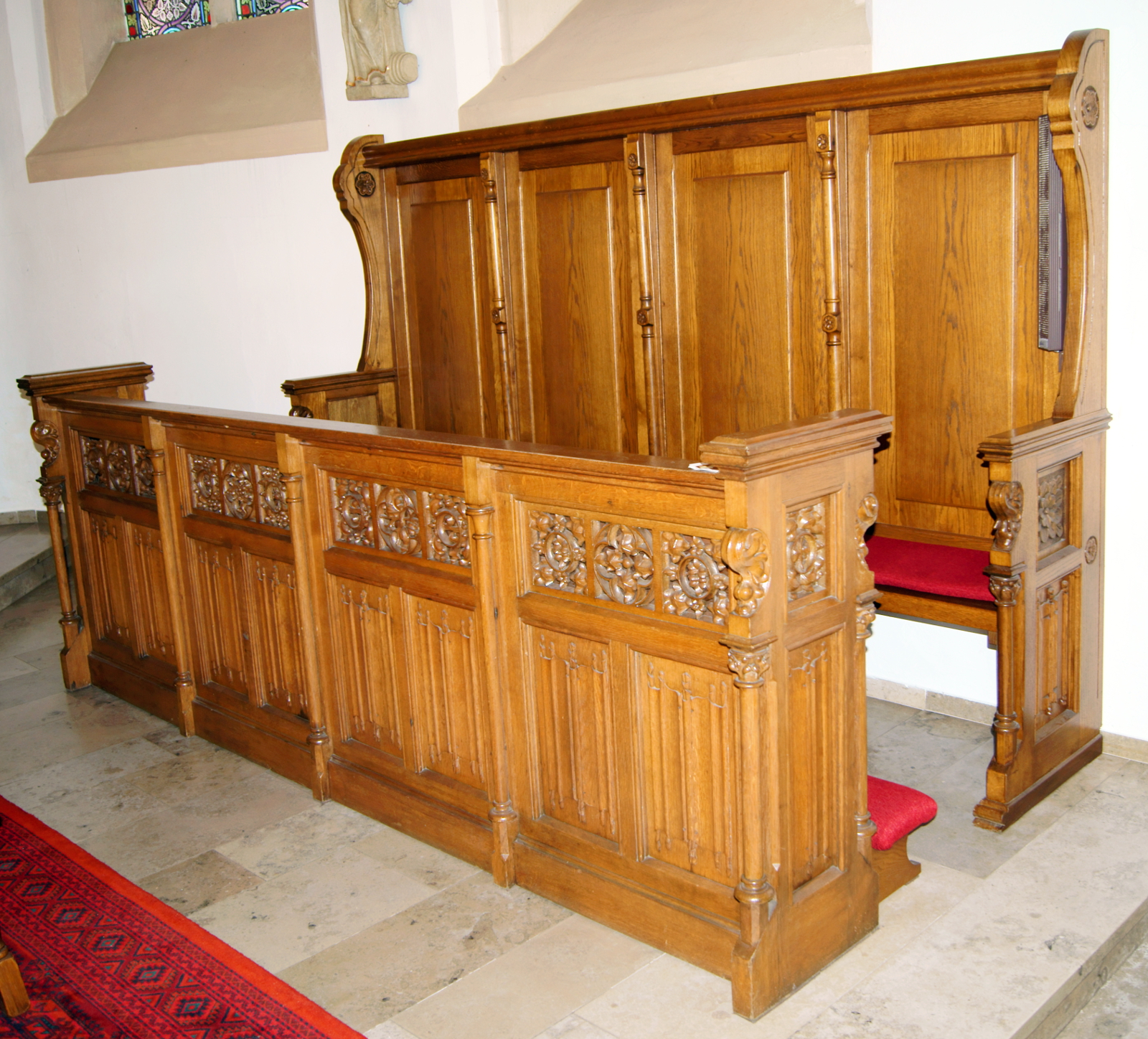 Chorgestühl in St. Marien, Burlo. This is a photograph of an architectural monument. A1 - A 26